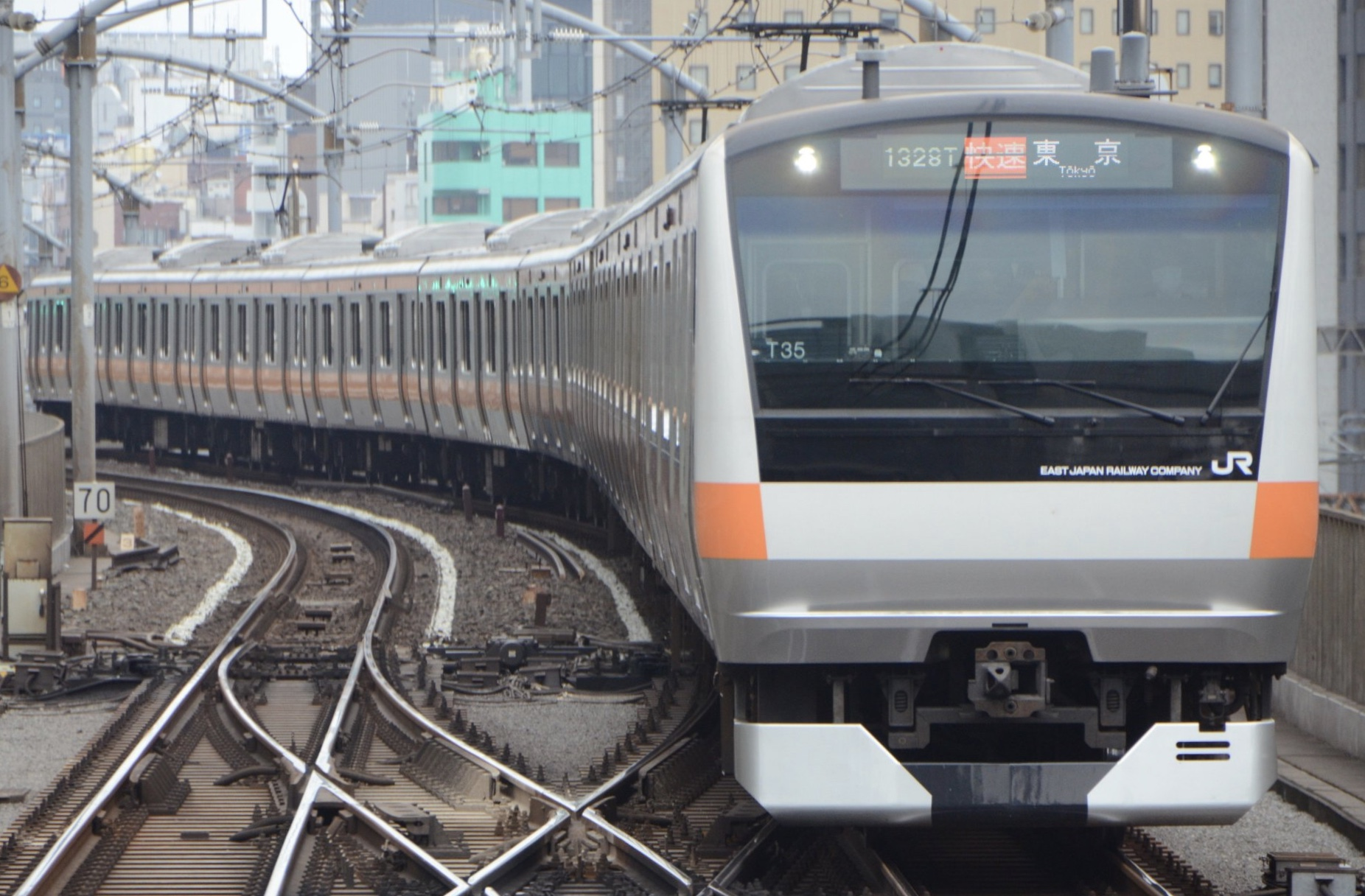 JR東日本E233系電車 中央線東京駅